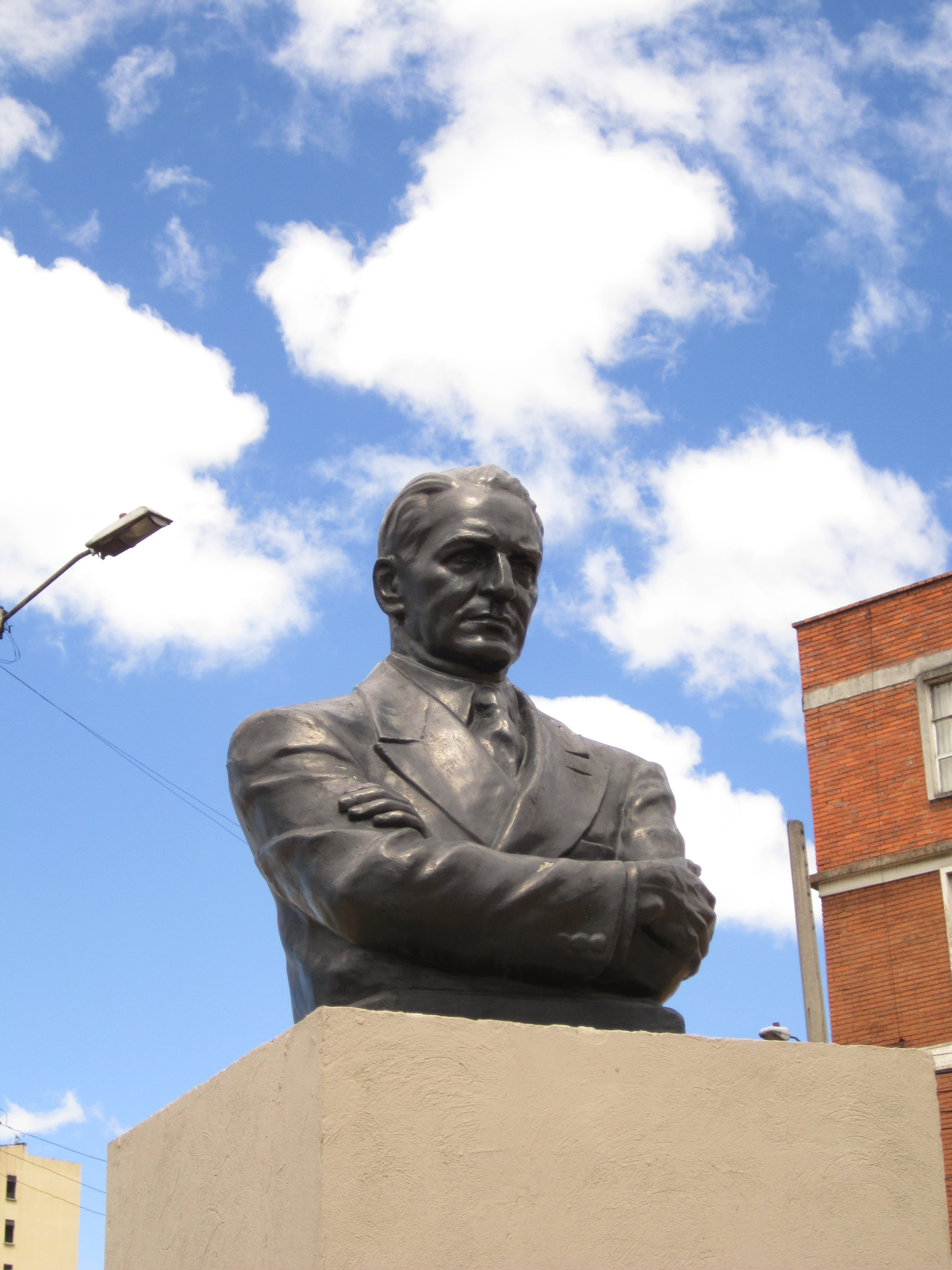 Busto Jorge Eliécer Gaitán en el av. 26